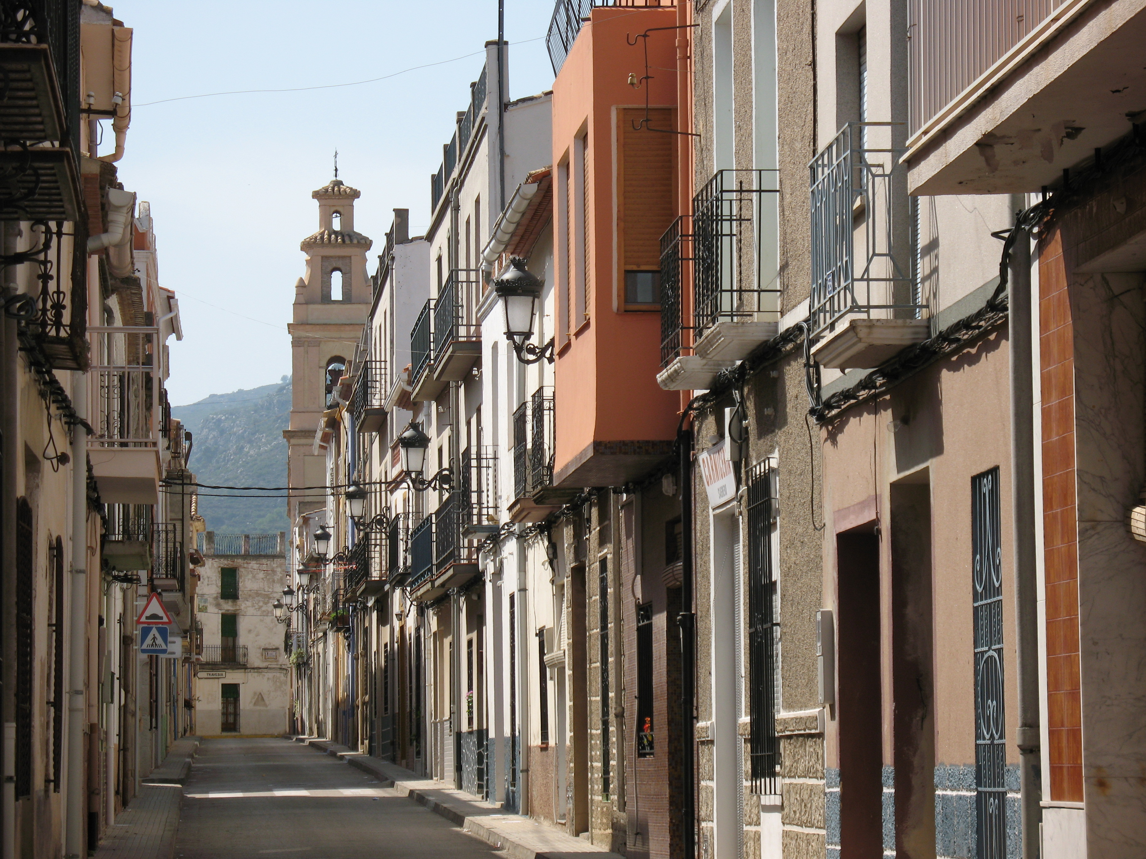 El Carrer Llarg en Benigembla